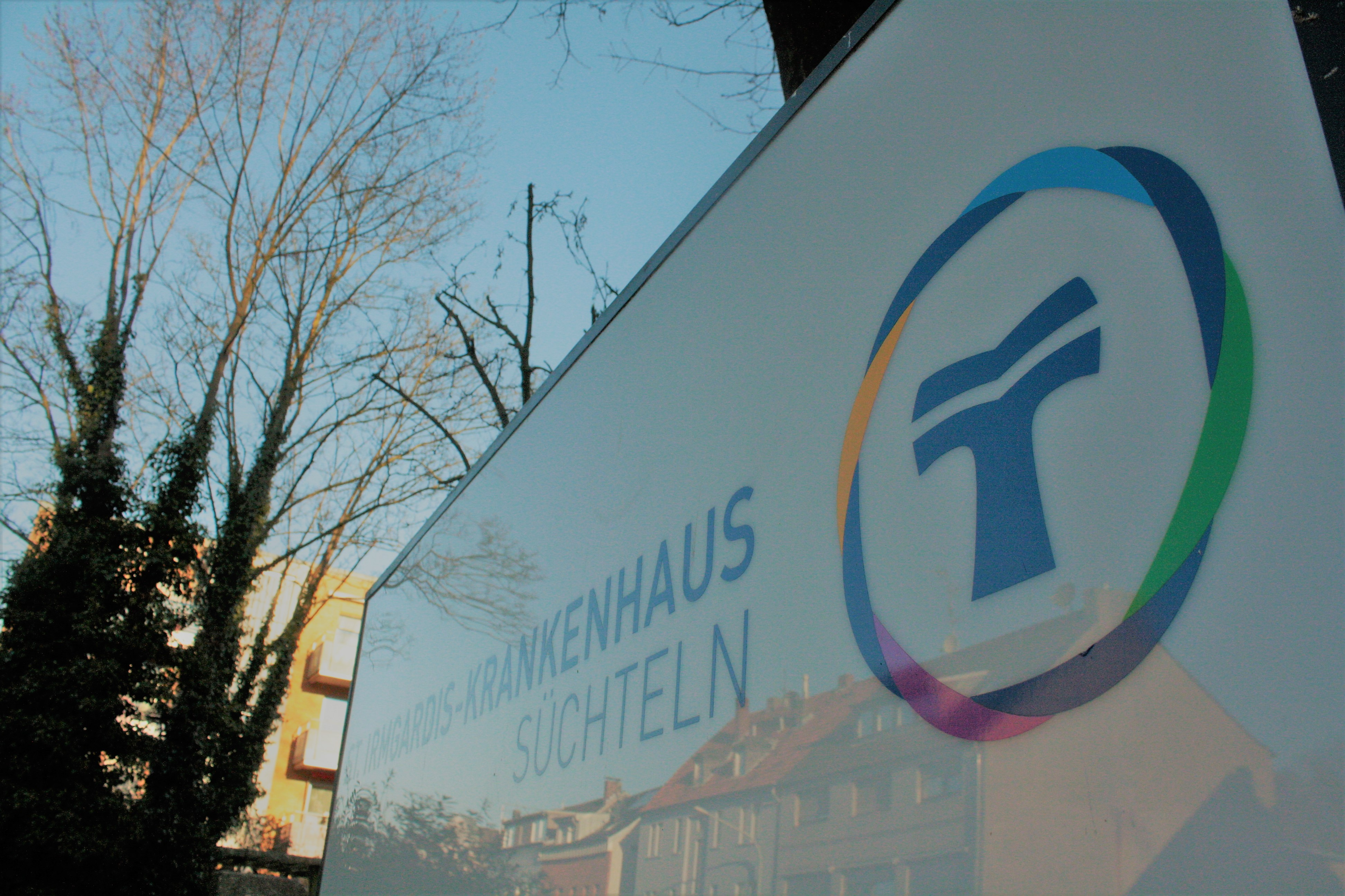 Auffahrt zum St. Irmgardis-Krankenhaus Süchteln.